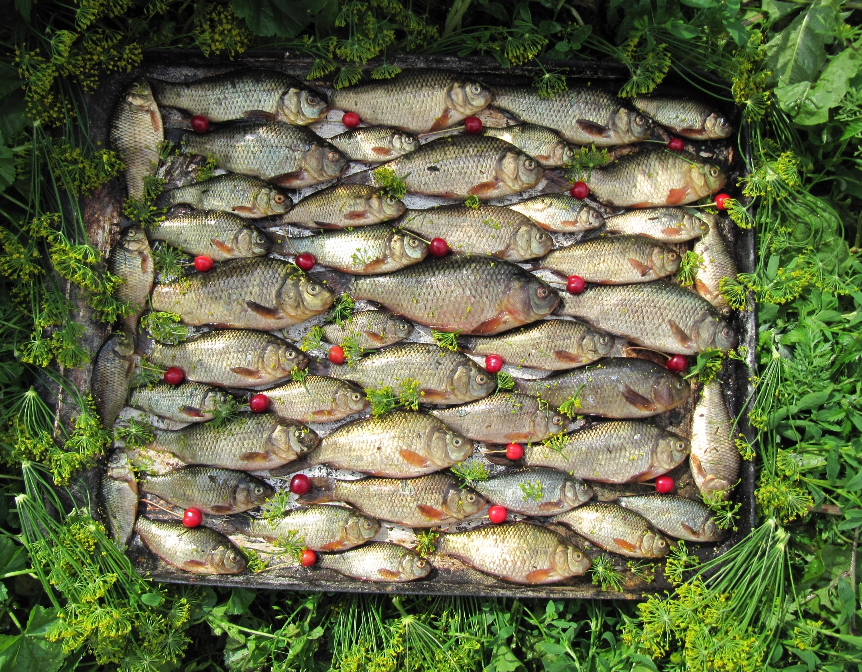 Натюрморт с карасями, вишней и укропом. Работа Бэлы Зиф.